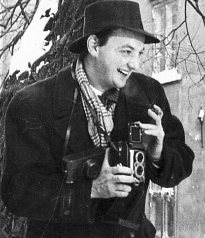 Fotografen K.W. Gullers